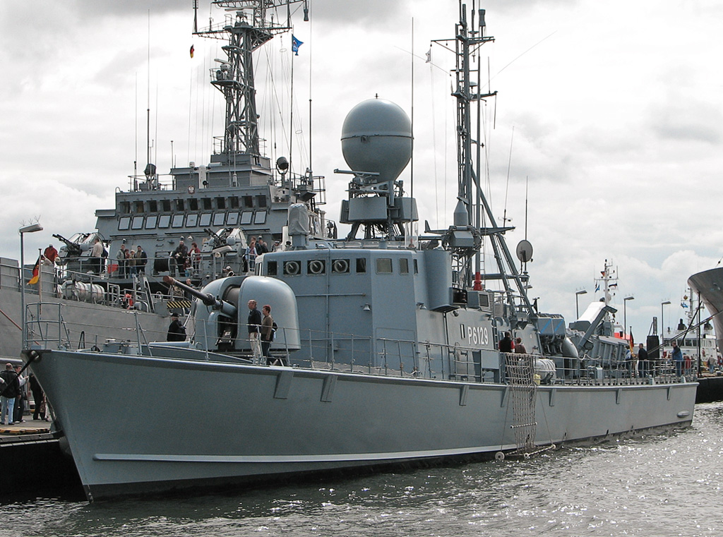 Beschreibung: Schnellboot P6129 S79 Wiesel / Gepard-Klasse / Marinestützpunkt Hohe Düne Fotograf: Darkone, 13. August 2005